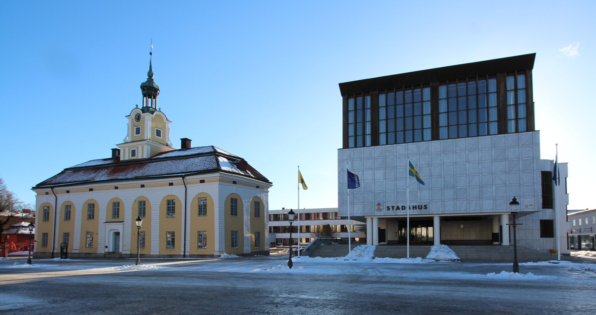 Stora Torget Nyköping. till vänster Rådhuset, Stadshuset till höger.